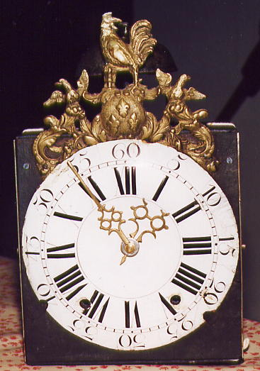 Horloge comtoise mouvement avec fronton au coq datée du 18ème siècle